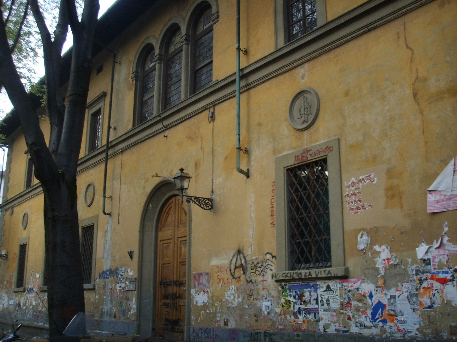 Casa del mutilato firenze 03